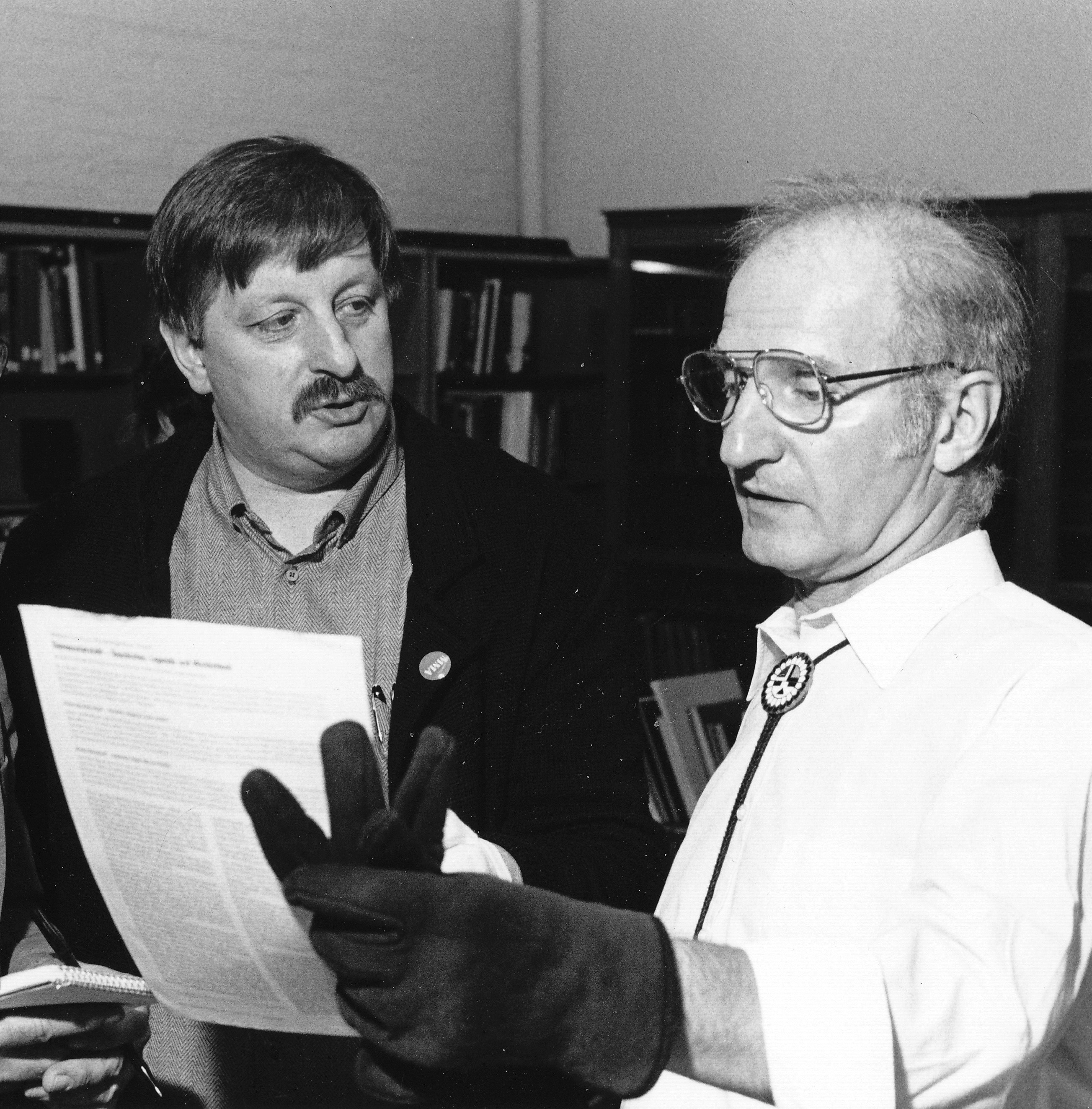 Ein Treffen von Damaszener Schmied Manfred Sachse und Dr. Helmut Nickel. Dr. Nickel ist in Deutschland vor allem für seine historischen Comics bekannt. Er arbeitete im Metropolitan Museum in New York bis zu seinem Ruhestand im Jahre 1989 als Kurator für historische Waffen.